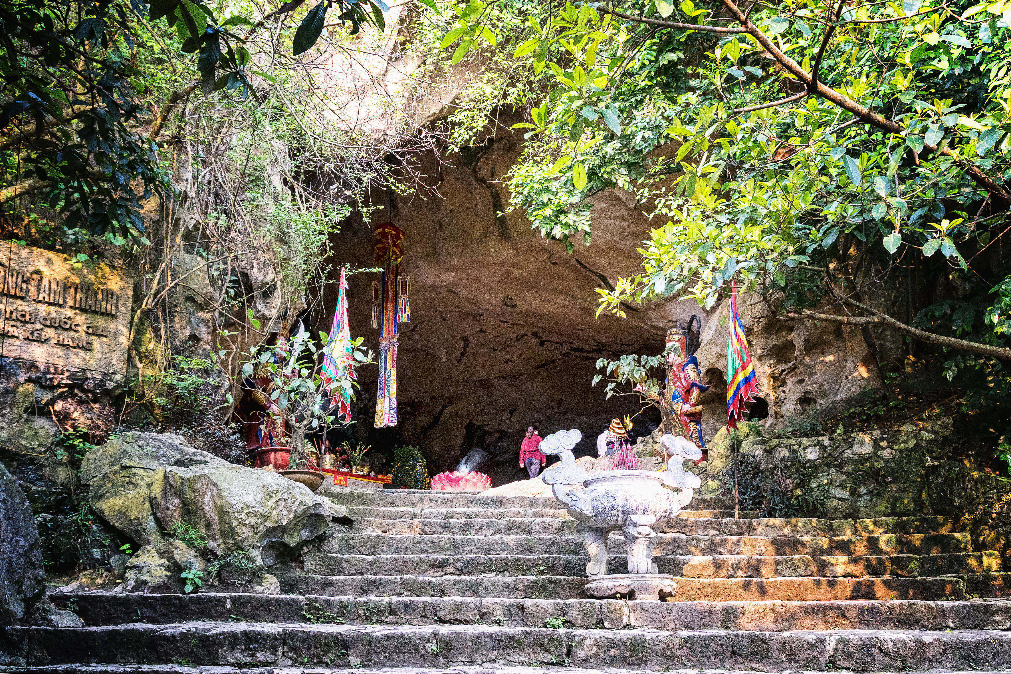 Cửa hang Tam Thanh ở Lạng Sơn, Việt Nam.